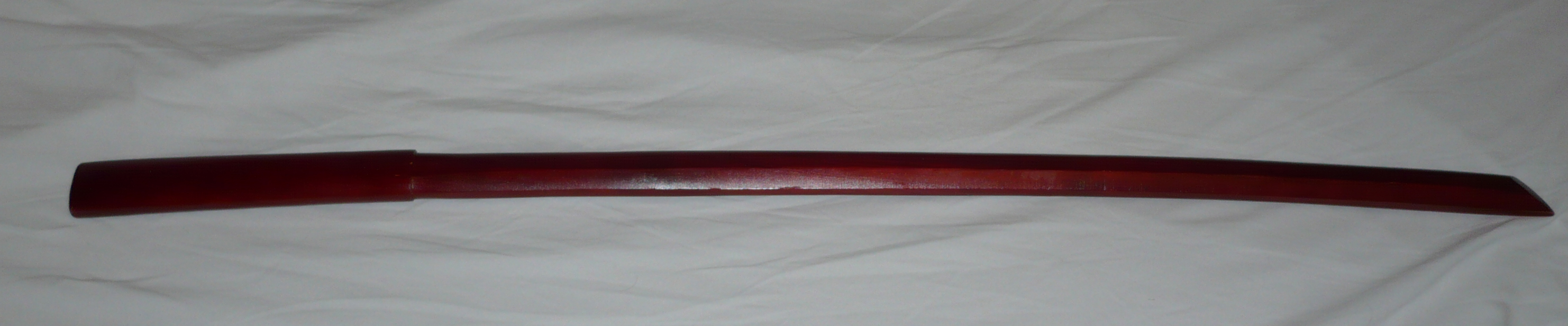 Bokken - japanese wooden weapon for training purpose / arme japonaise en bois pour l'entraînement